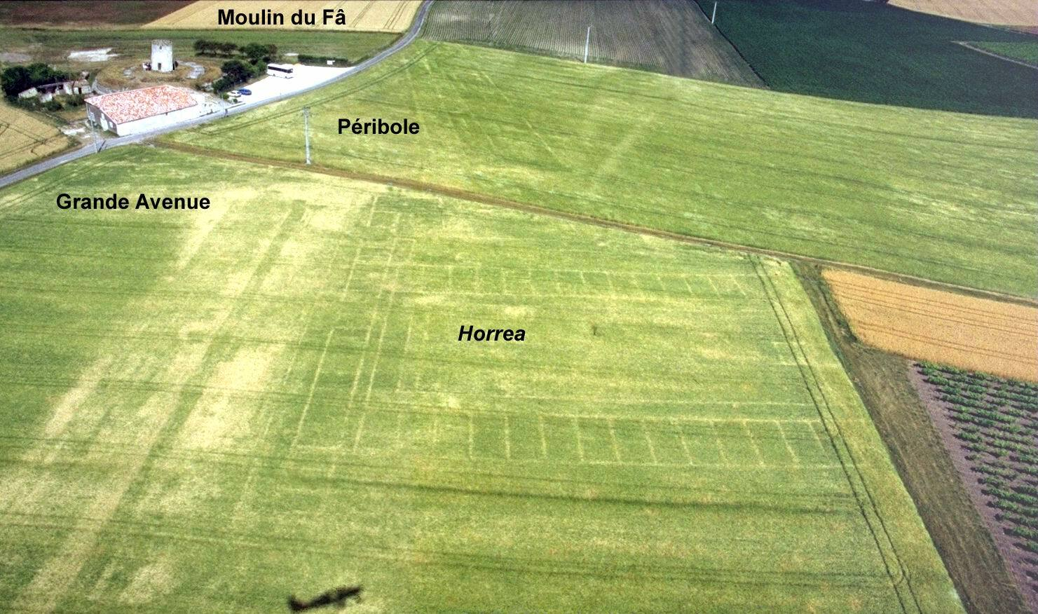 photo aérienne de BARZAN (17) Moulin du Fâ: La grande avenue et les horrea. Les traces de la ville gallo-romaine de Novioregum. On distingue à gauche la Grande Avenue, bordée de boutiques. Au centre, les horrea, entrepôts d'état, impliquant des stockages de marchandises, prélude à un transbordement vers la zone portuaire et l'embarquement sur les navires de cabotage côtier. Novioregum était incontestablement un port.